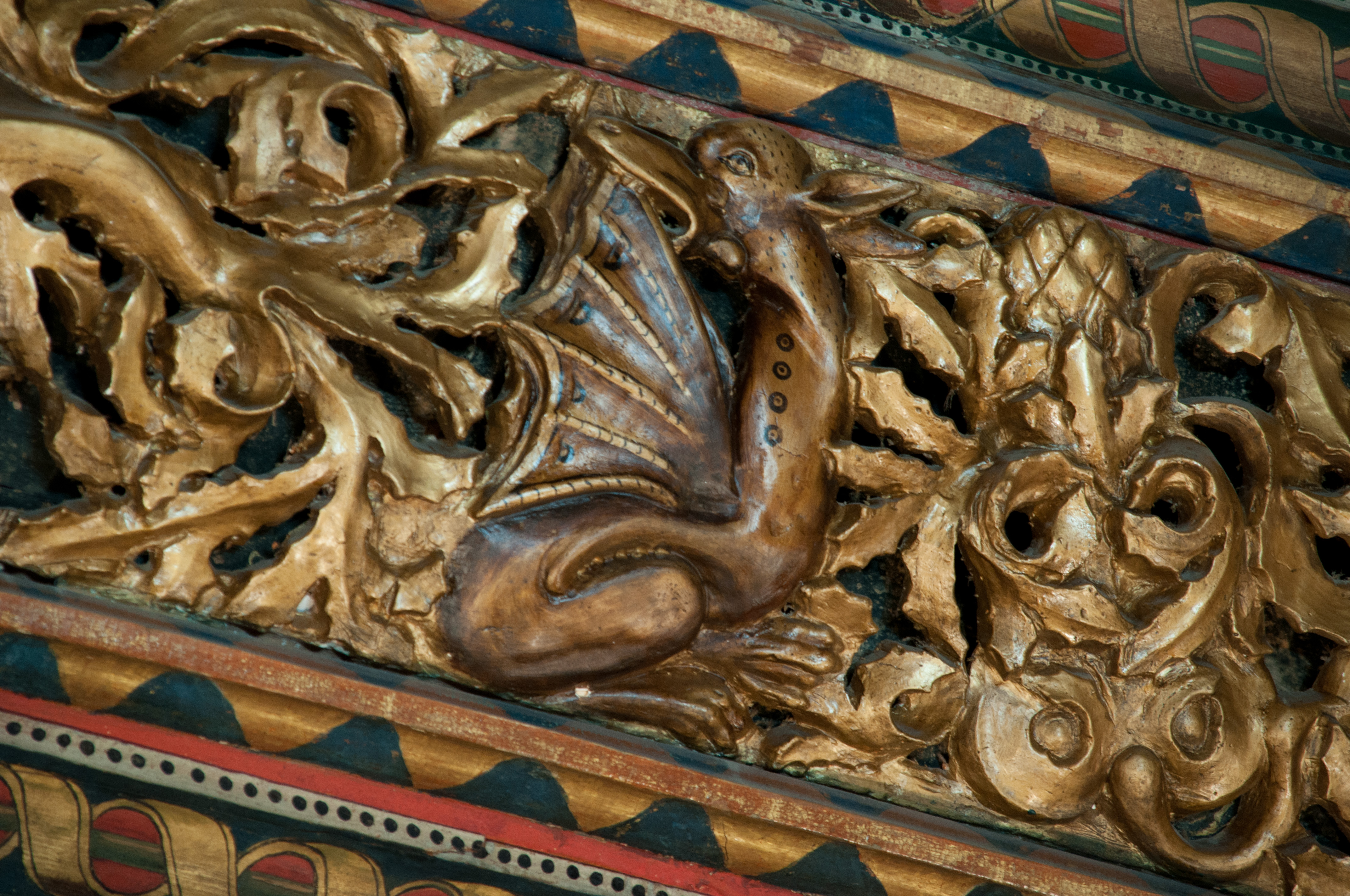 Aparecen dragones en la Sala del Trono de la Aljafería por que los reyes aragoneses eran llamados los reyes dragón, por ser reyes "d'Aragón".